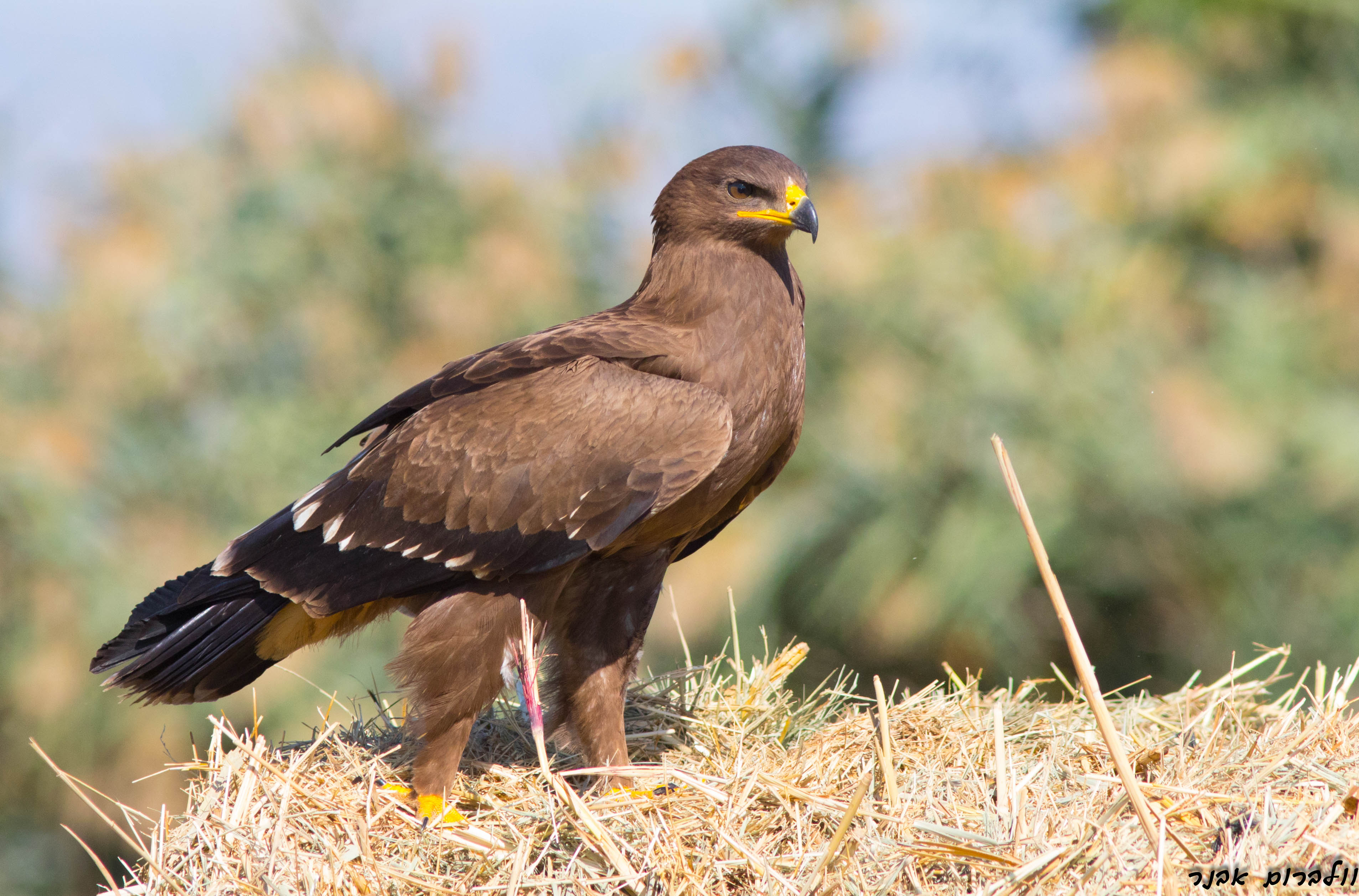 עיט חורש lesser spotted eagle צולם באגמון החולהש